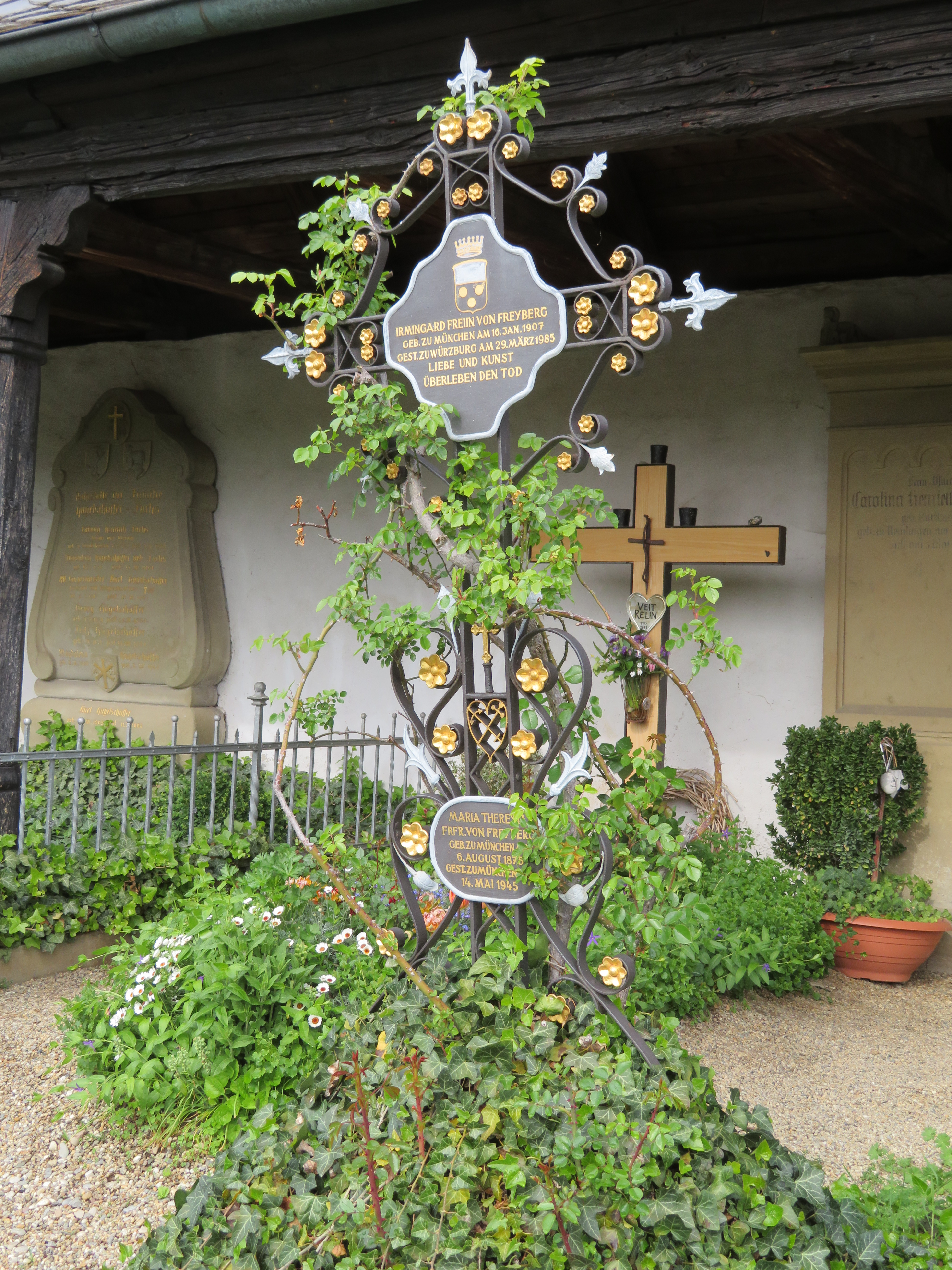 Grabmal Irmingard von Freyberg